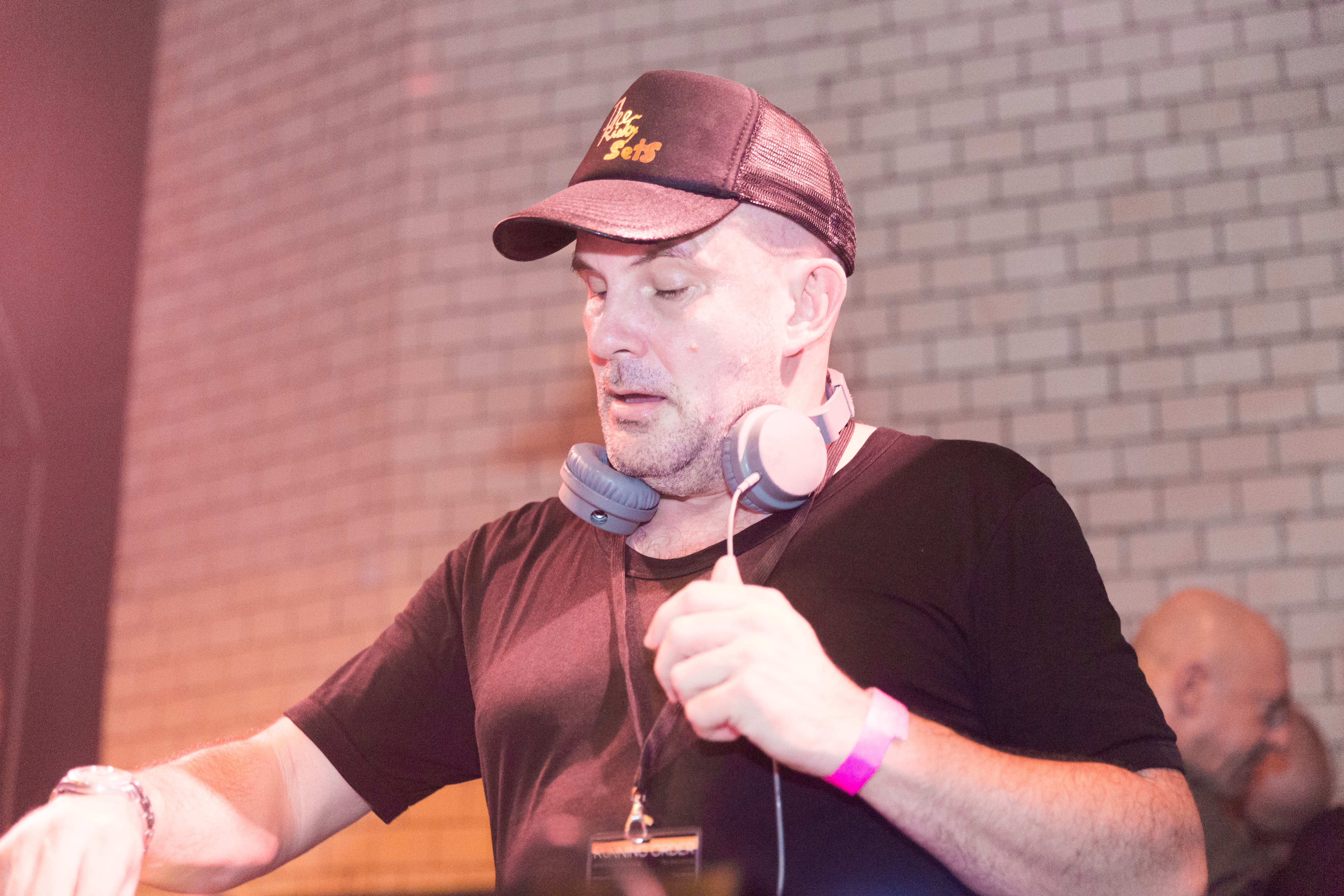 WestBam (bürgerlich Maximilian Lenz) - Dieses Bild ist auf dem Sterne und Bass Festival am 30. Januar 2016 im Berliner E-Werk entstanden.